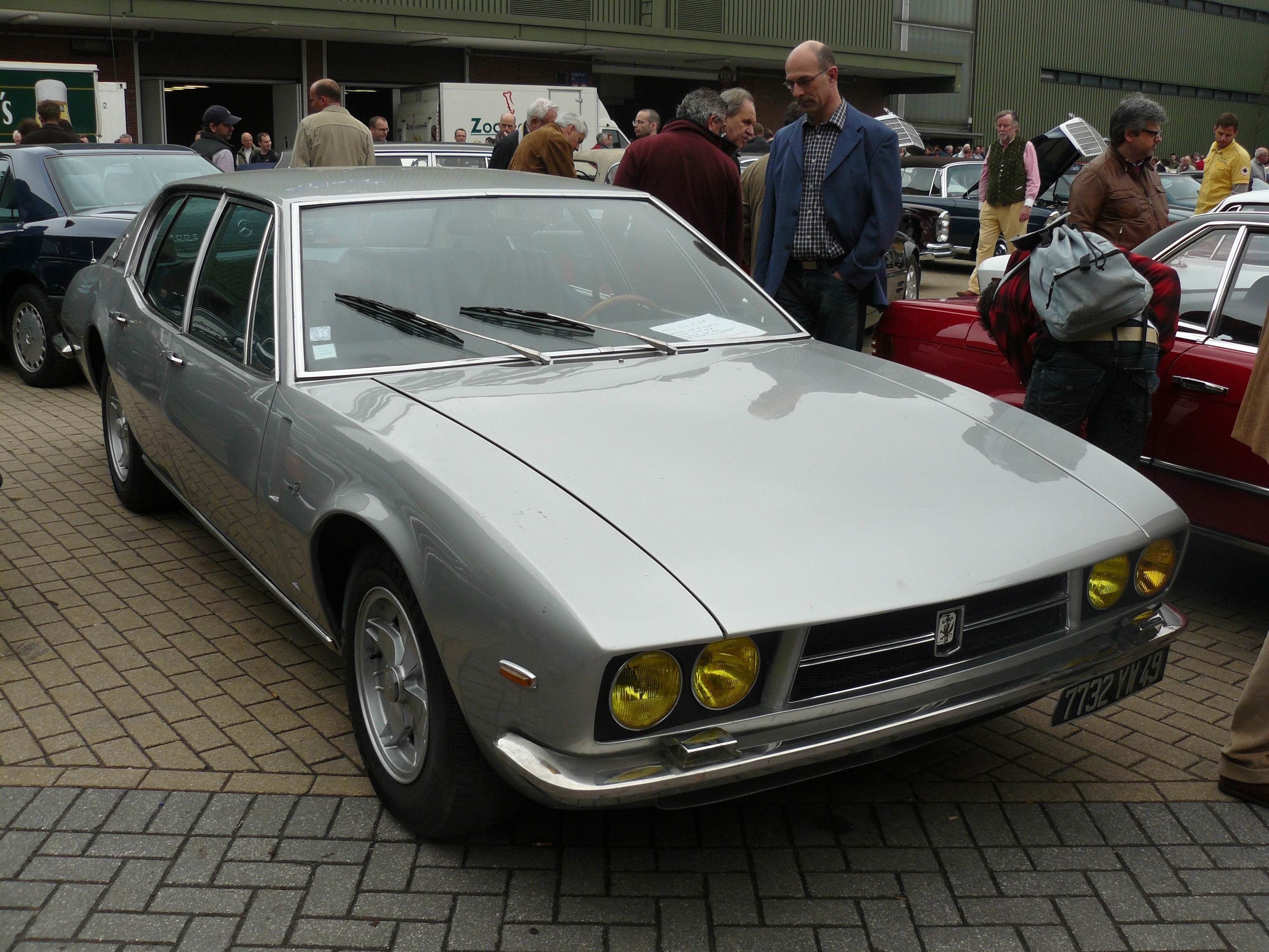 Essen 2011